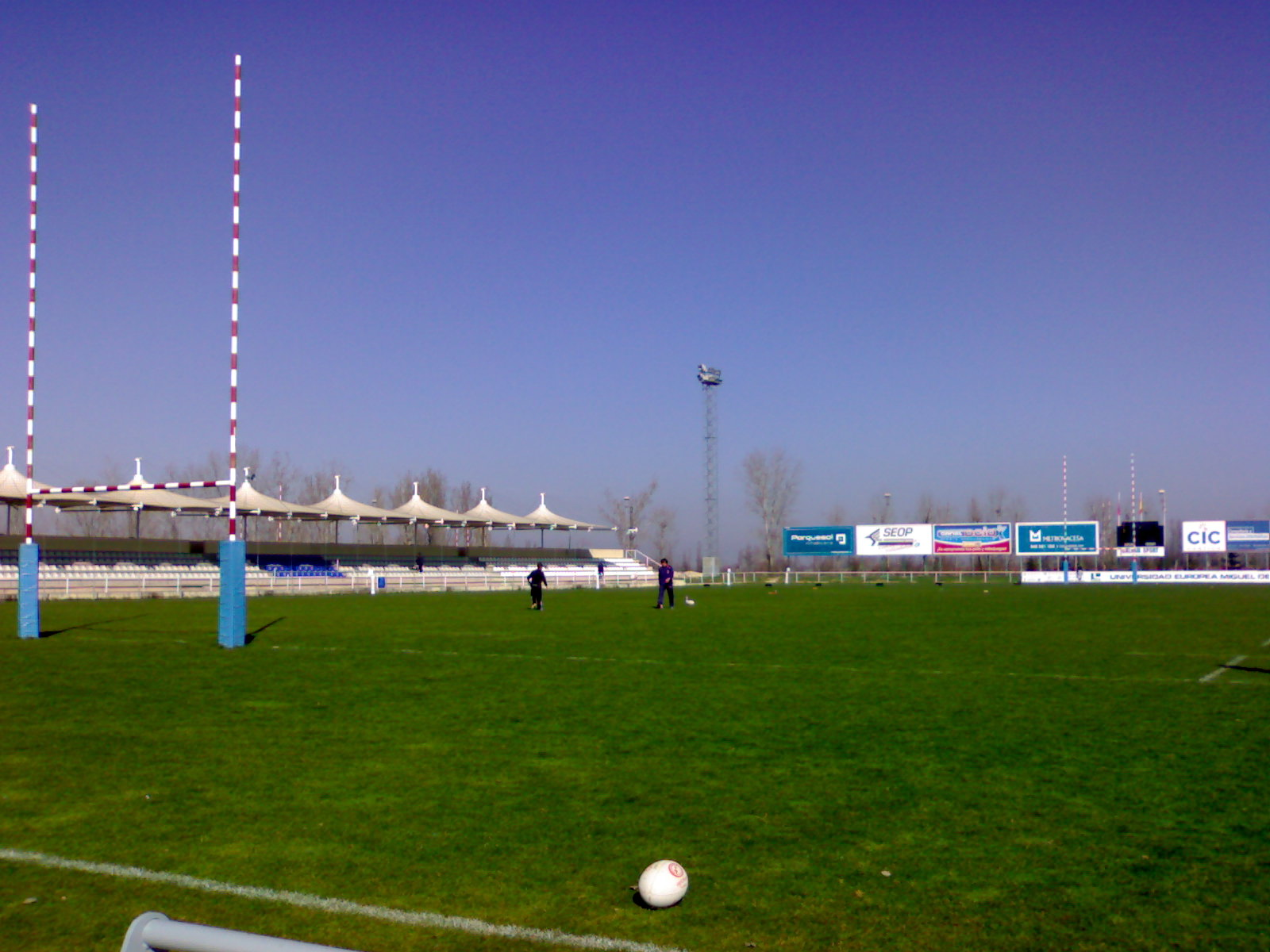 Campos de Pepe Rojo, Valladolid